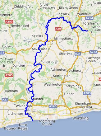 Carte réalisée sur umap This map may be incomplete, and may contain errors. Don't rely solely on it for navigation.